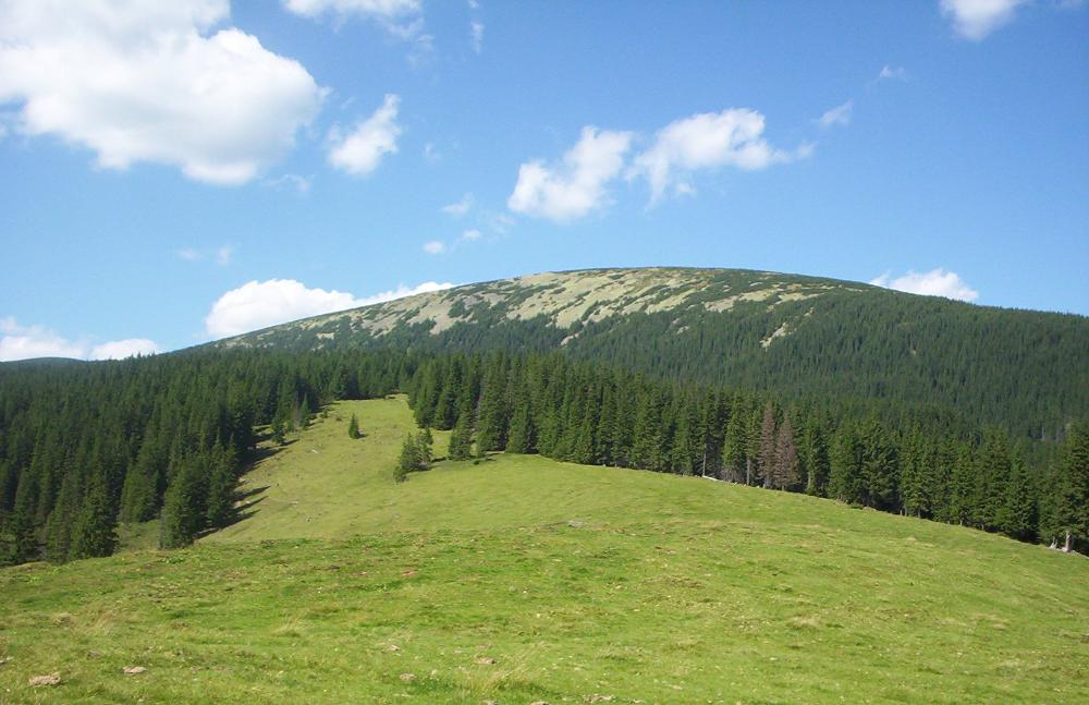 Połonina Bojdryńska, nad nią Bojaryn.